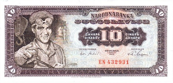 10 Yugoslav dinar (1965) - obverse